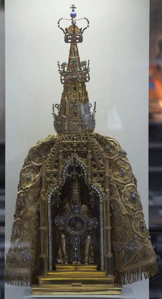 Kerkschat/Trésor de la cathédrale, croix reliquaire du Saint Sacrement du Miracle, 1500-1670